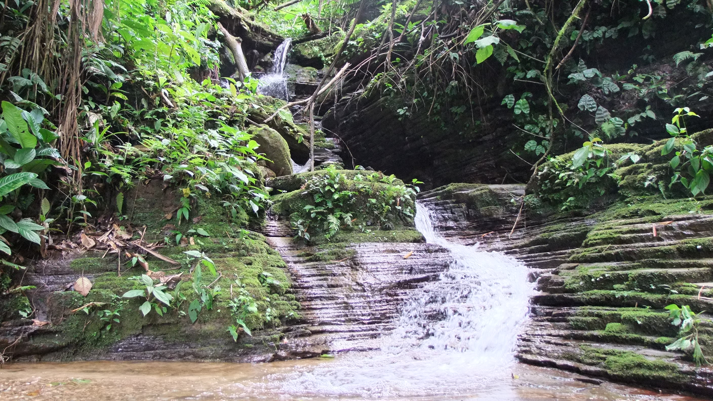 Cascadas del valle misterioso, Huambi, Sucua, Ecuador